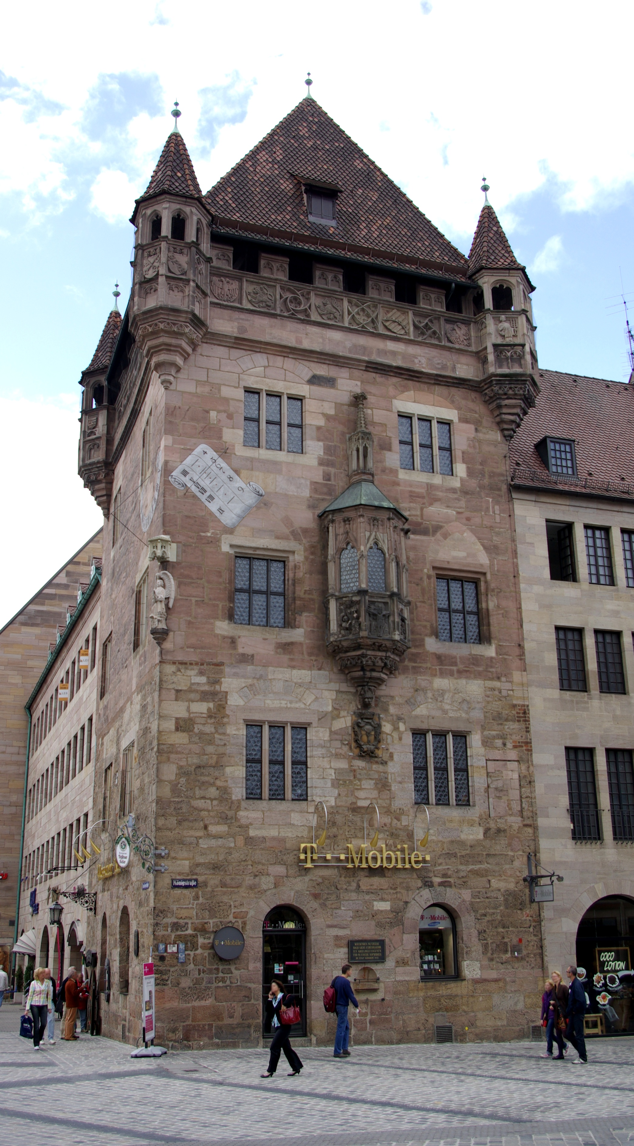 Ostfassade des Nassauer Hauses in Nürnberg